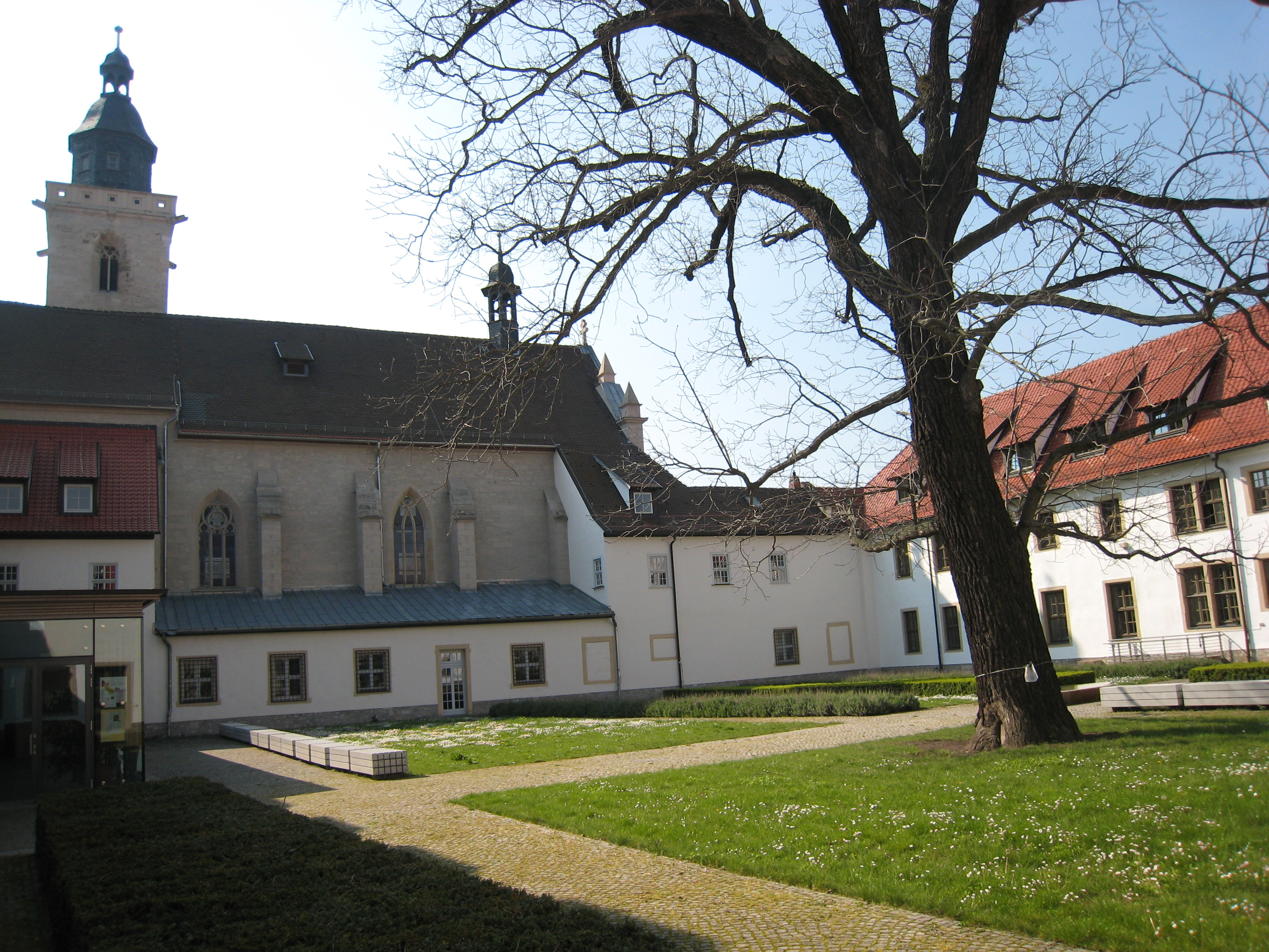 Valentinerhof mit der Wigbertikirche in Erfurt.